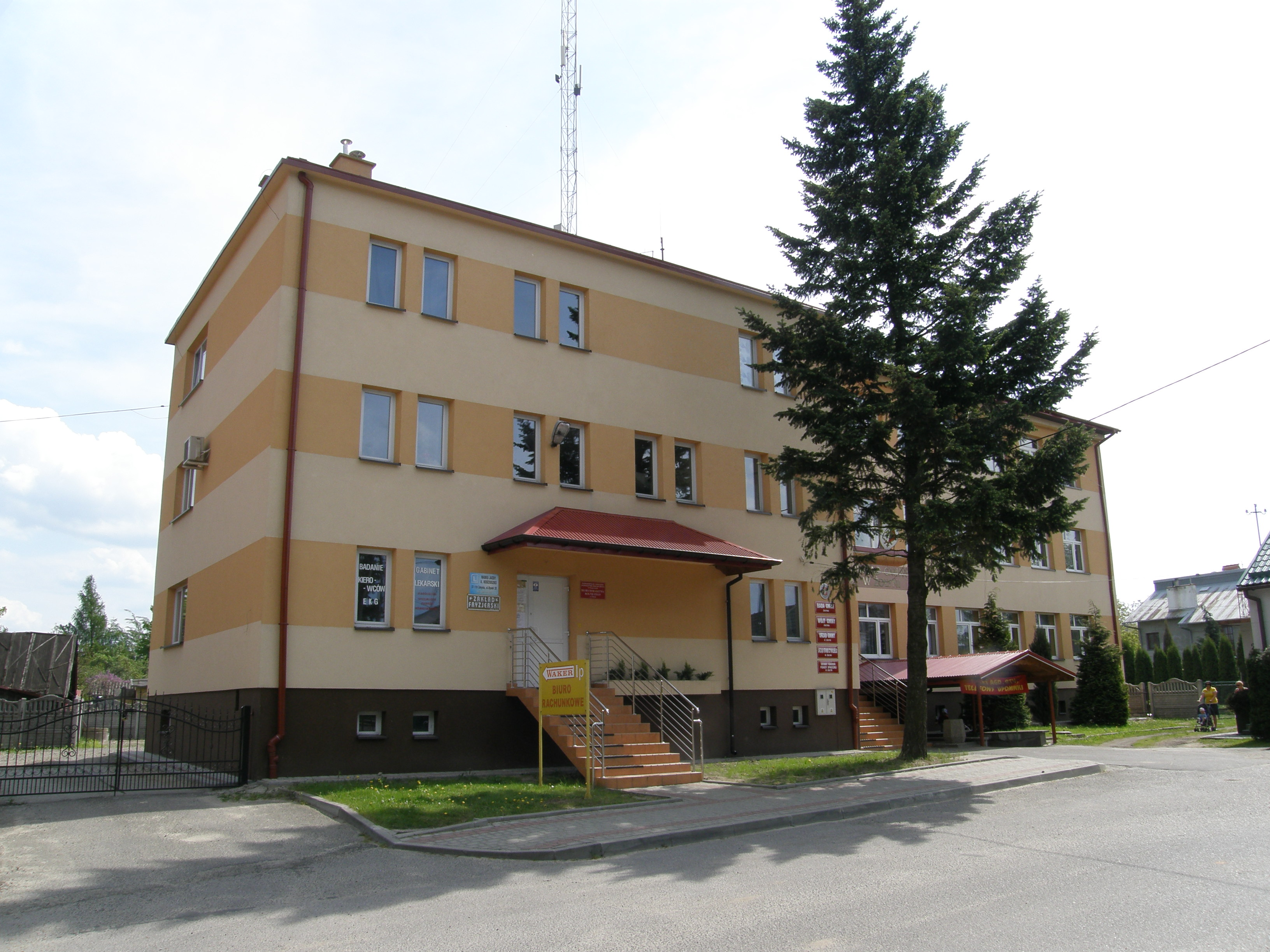 Urząd gminy w Żołyni: 1) rada gminy, 2) wójt gminy, 3) urząd gminy, 4) urząd stanu cywilnego, 5) gminny ośrodek pomocy społecznej